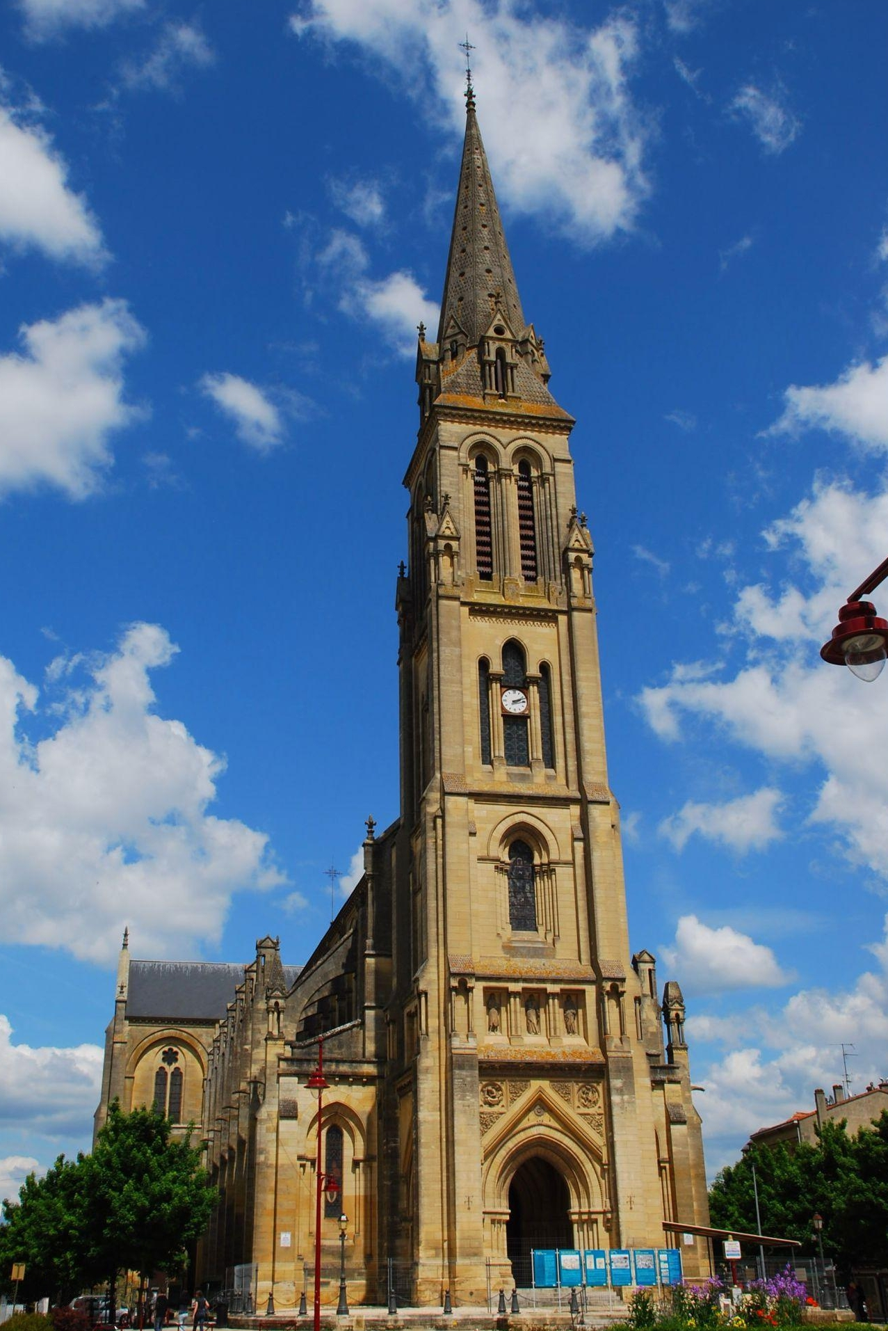 Iglesia de Notre Dame en Bergerac (Francia)